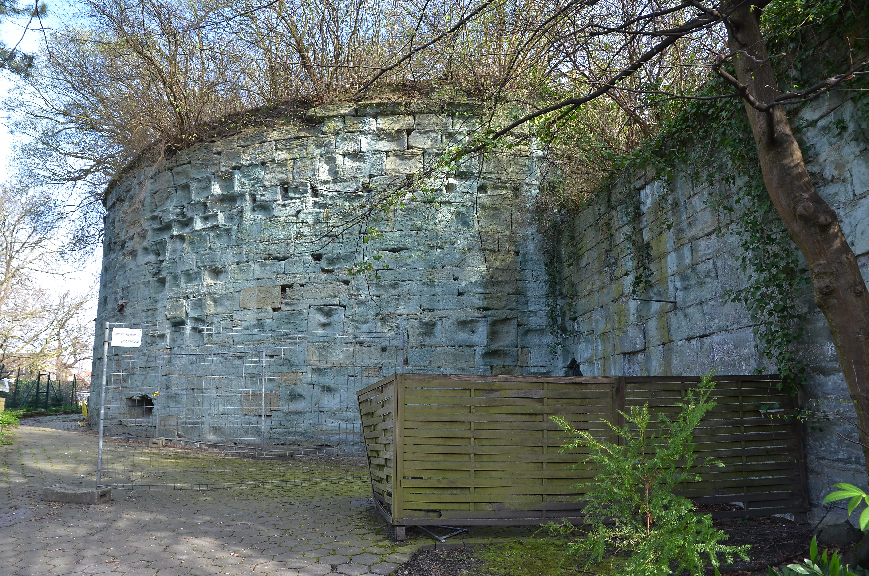 Werl, denkmalgeschütztes Altes Schloss, Ruine, Schloßstraße Anischt h